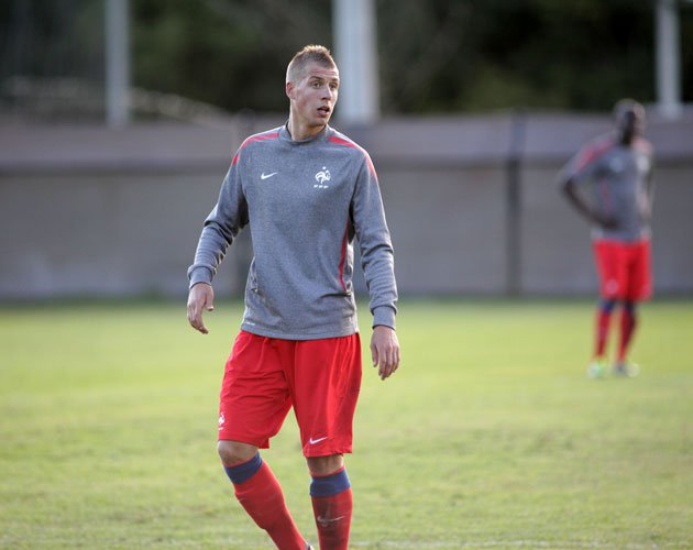 equipe de france